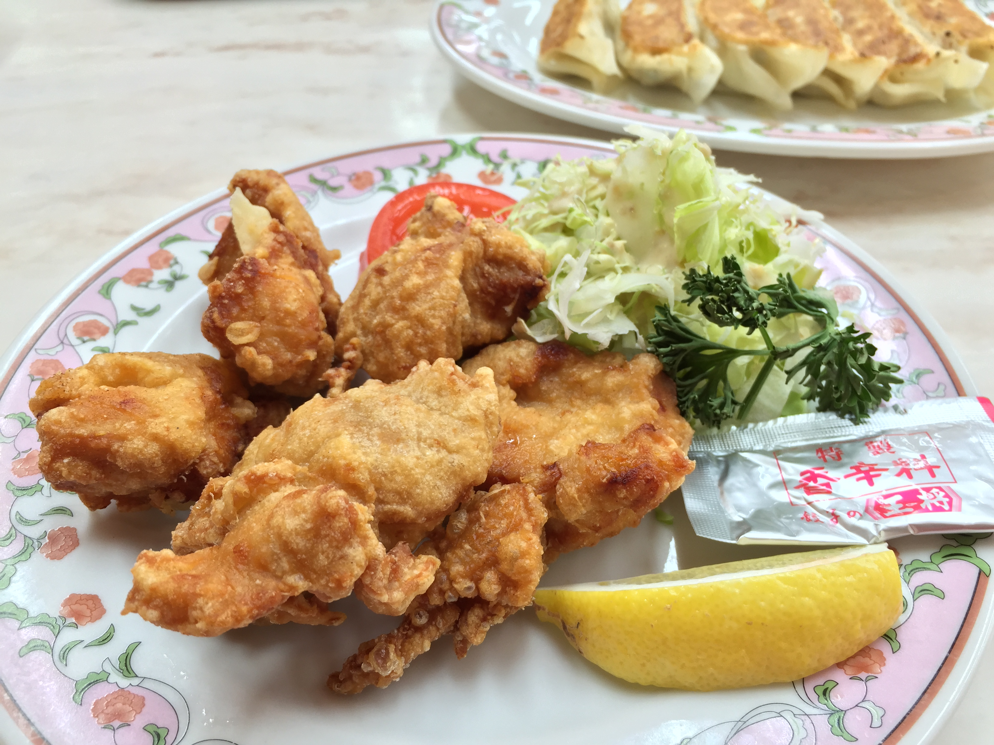 Fried Chicken, Matsumoto, Nagano, Japan, 鶏の唐揚, 餃子の王将, 餃子的王將, アリオ松本店, 松本, まつもとし, 長野縣, 長野県, ながのけん, 日本, にっぽん, にほん